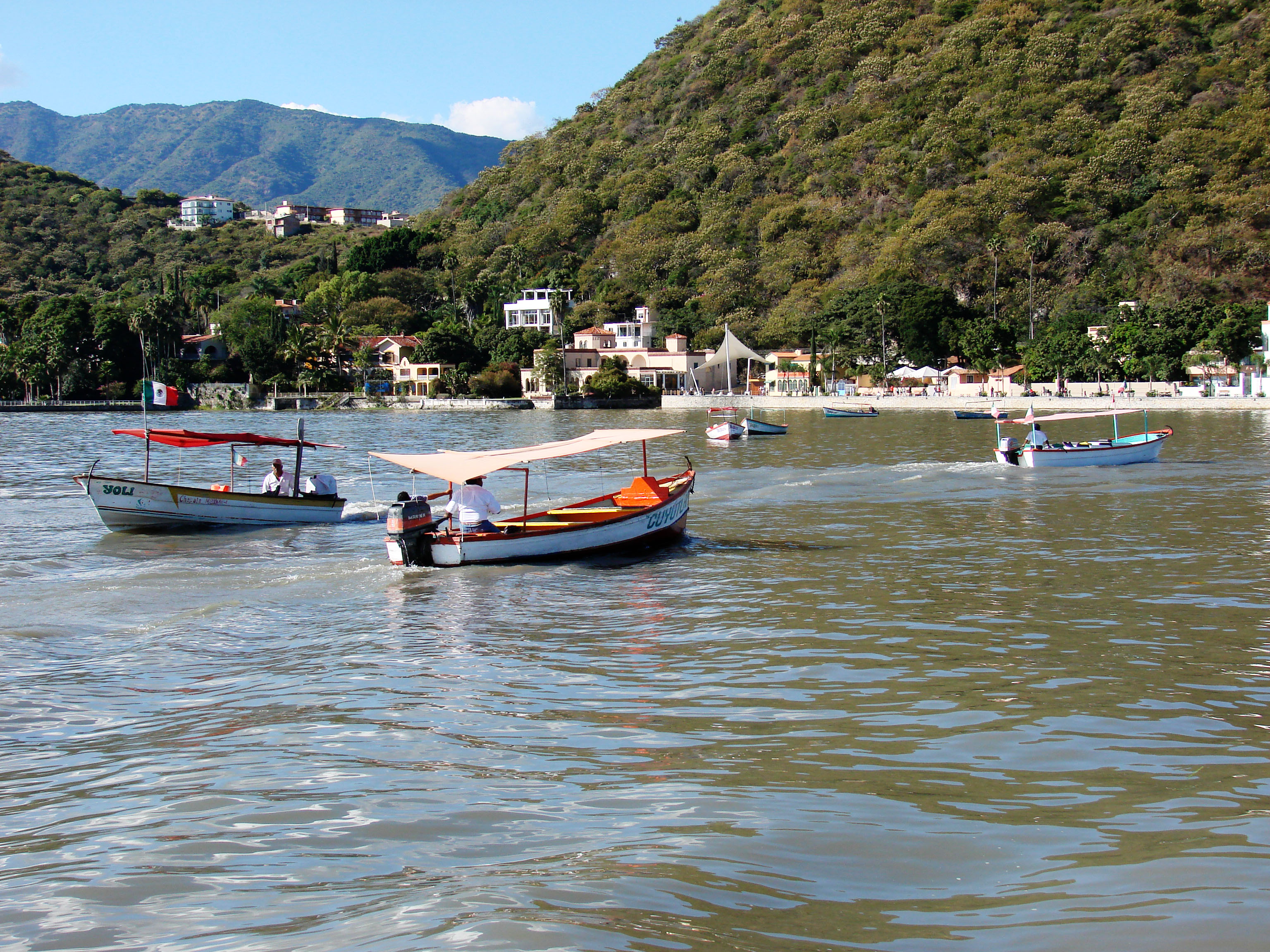 Lake Chapala, Jalisco